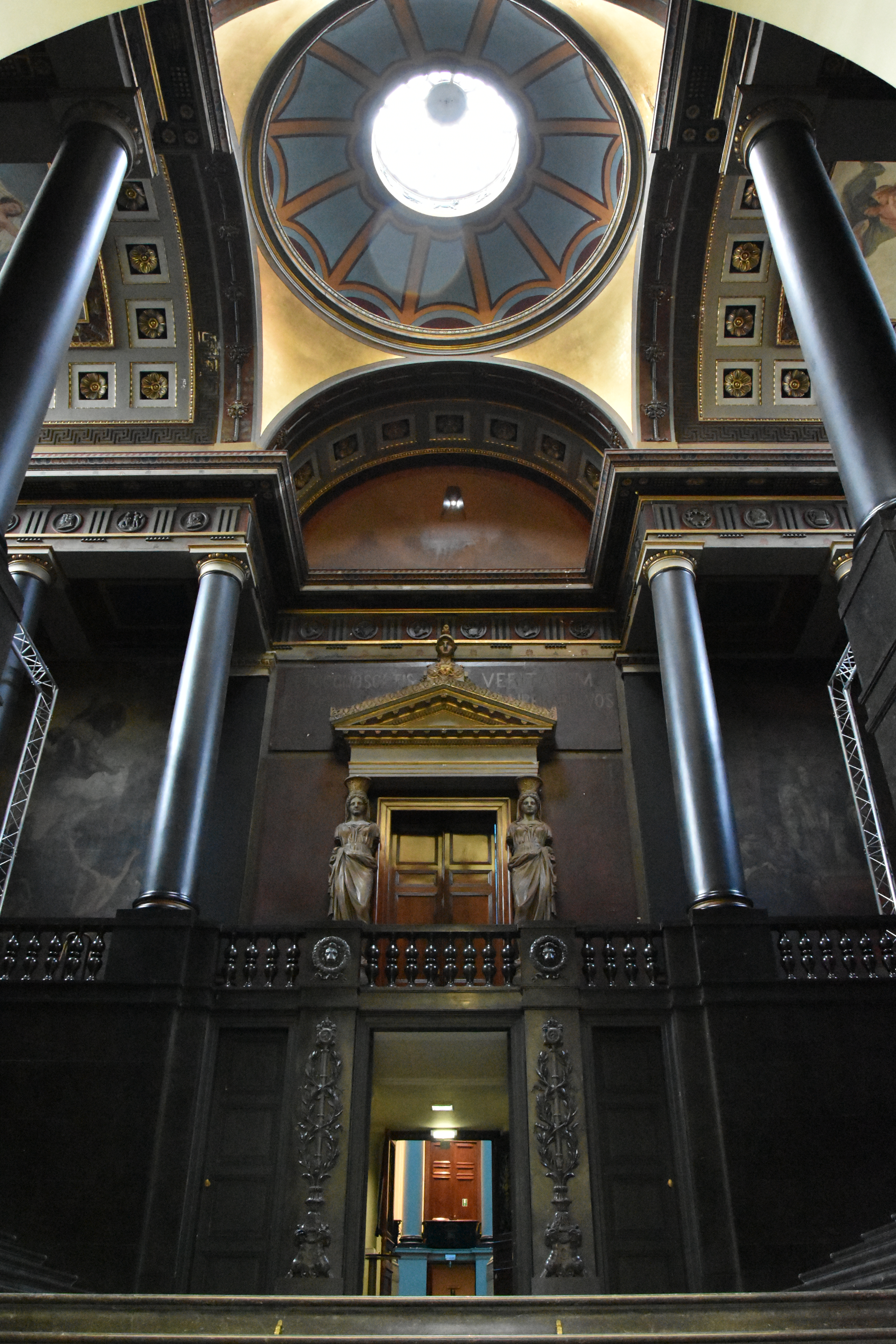 Gent - Aula Academica - vanaf de trap richting academieraadzaal